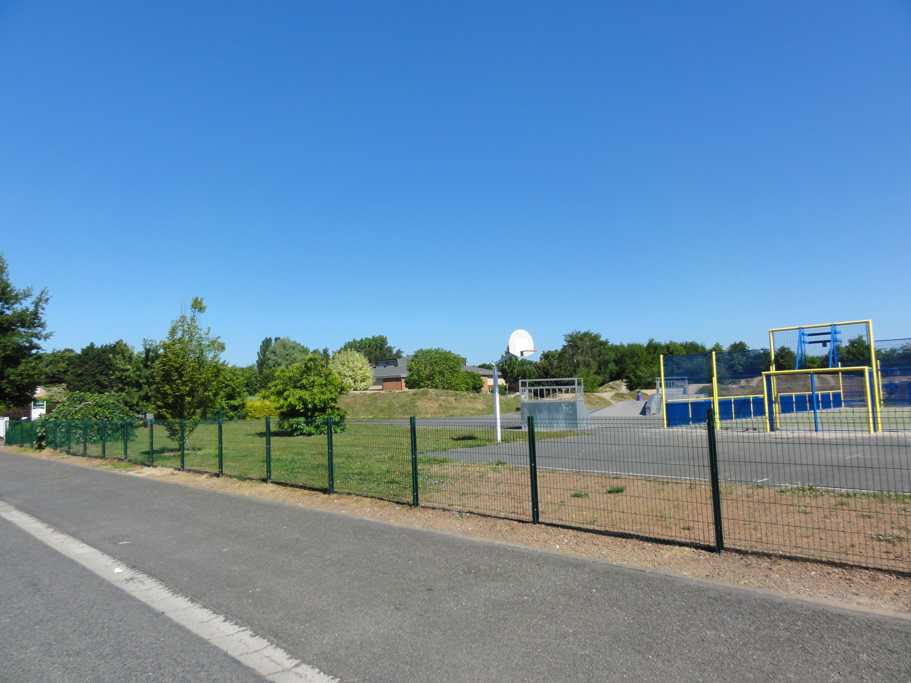 Terril n° 226 dit 1 de Vimy, Fosse n° 1 - 1 bis de la Compagnie des mines de Vimy-Fresnoy, Vimy, Pas-de-Calais, Nord-Pas-de-Calais, France.